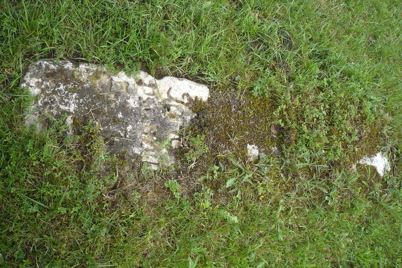 Stary cmentarz. Biały Kamień